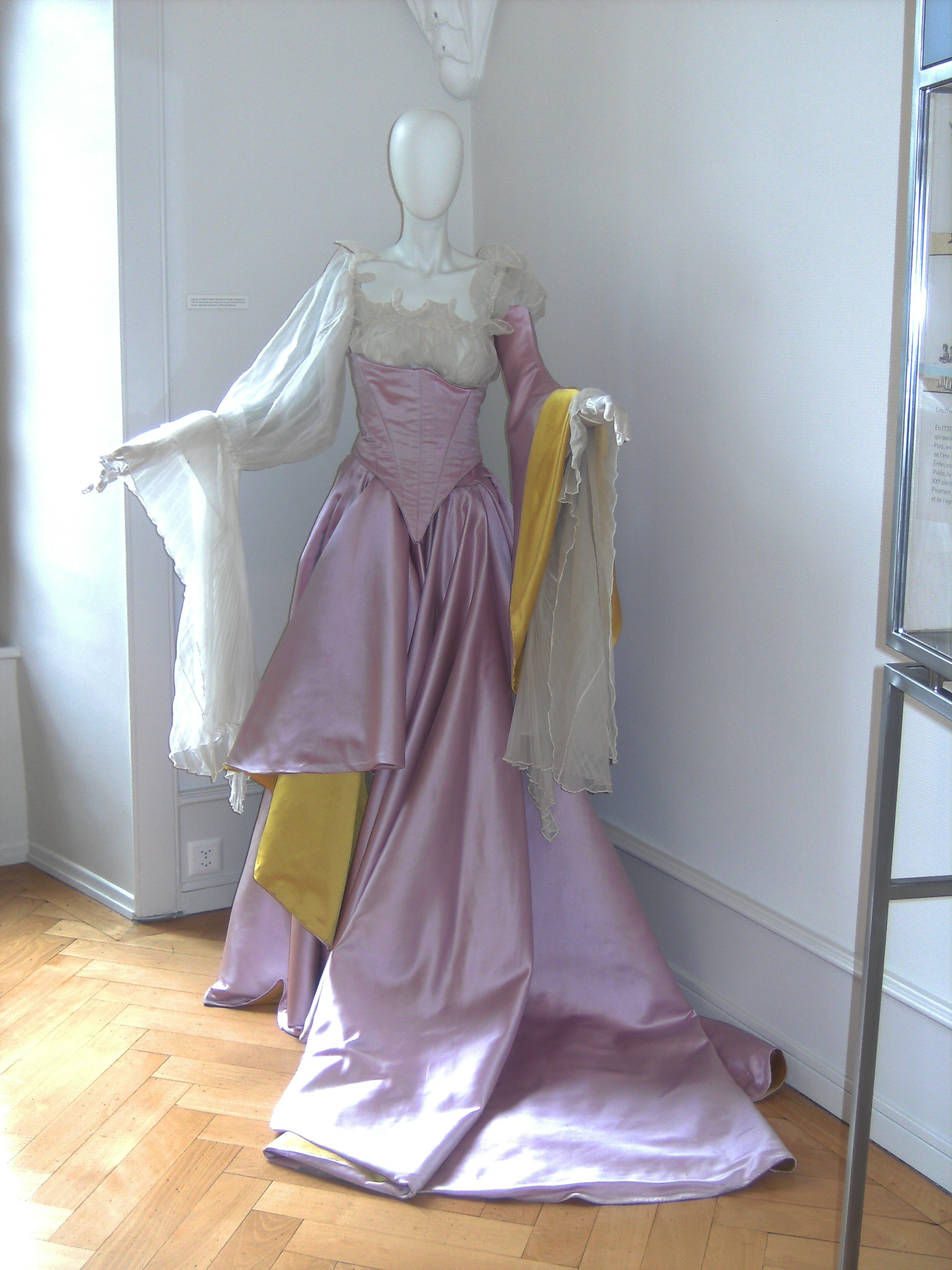 Vevey (Suisse) - musée de la Confrérie des Vignerons - Costume de Palès, incarnée par Florence Faure lors de la fête de 1999. Costume créé par Christian Lacroix.